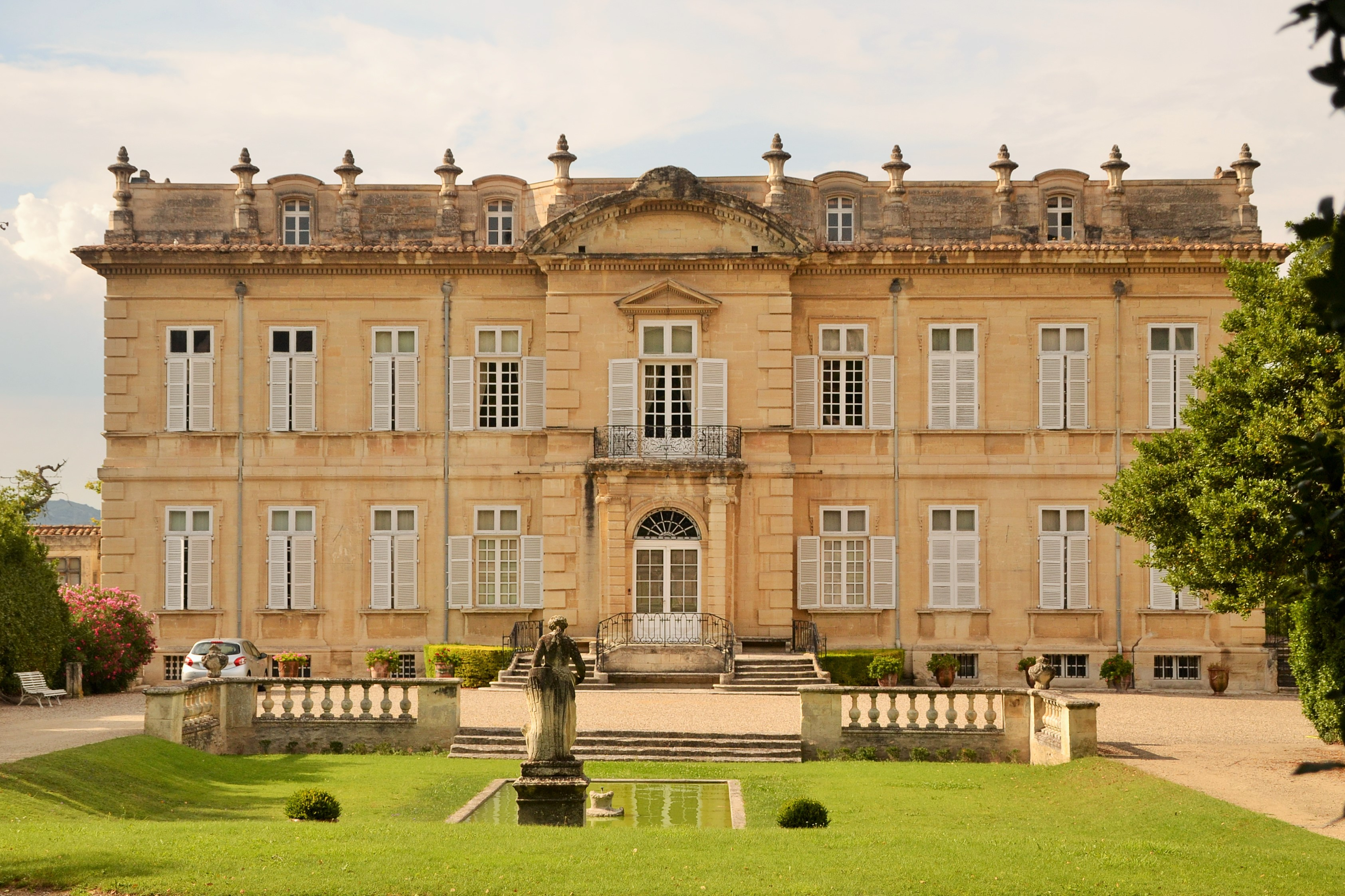 Le château des marquis de Barbentane.